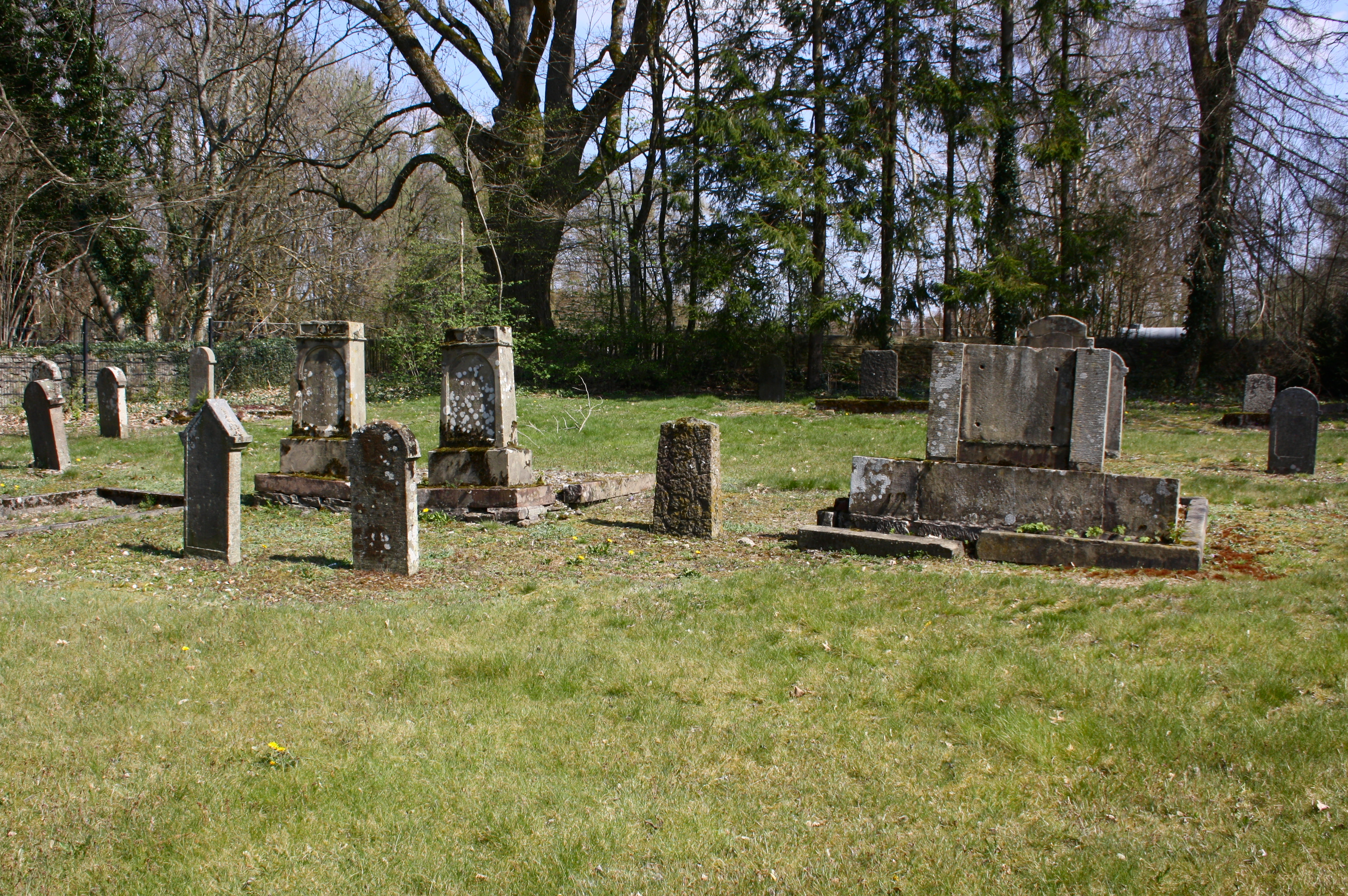 Jüdischer Friedhof, Hachenburg, Westerwaldkreis, Rheinland-Pfalz, Deutschland